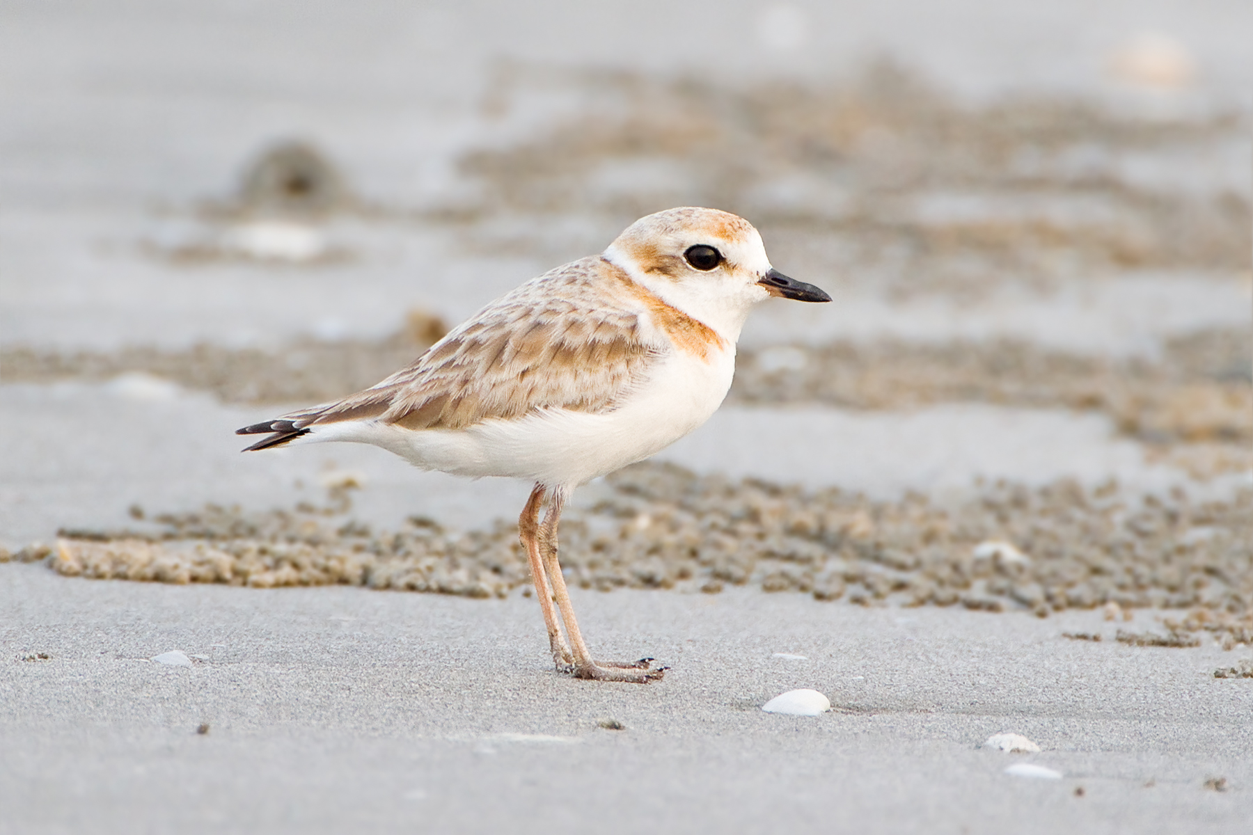 Malaysian Plover (Charadrius peronii), Laem Phak Bia, Ban Laem, Phetchaburi, Thailand